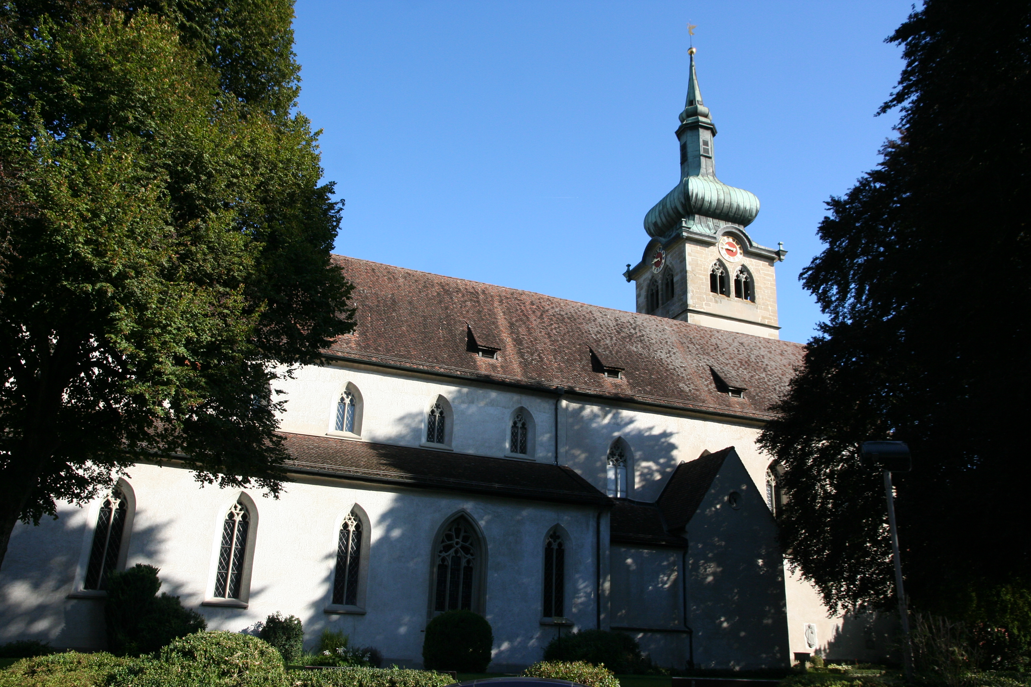 röm.-kath. Pfarrkirche St. Pelagius in Bischofszell